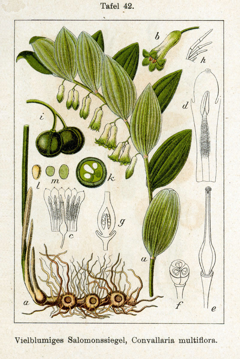 Polygonatum multiflorum (L.) All., syn. Convallaria multiflora L. Original Description Vielblumiges Salomonssiegel, Convallaria multiflora